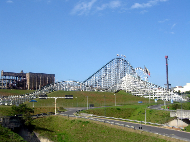 Parque Hopi Hari em Valinhos, São Paulo, Brasil.